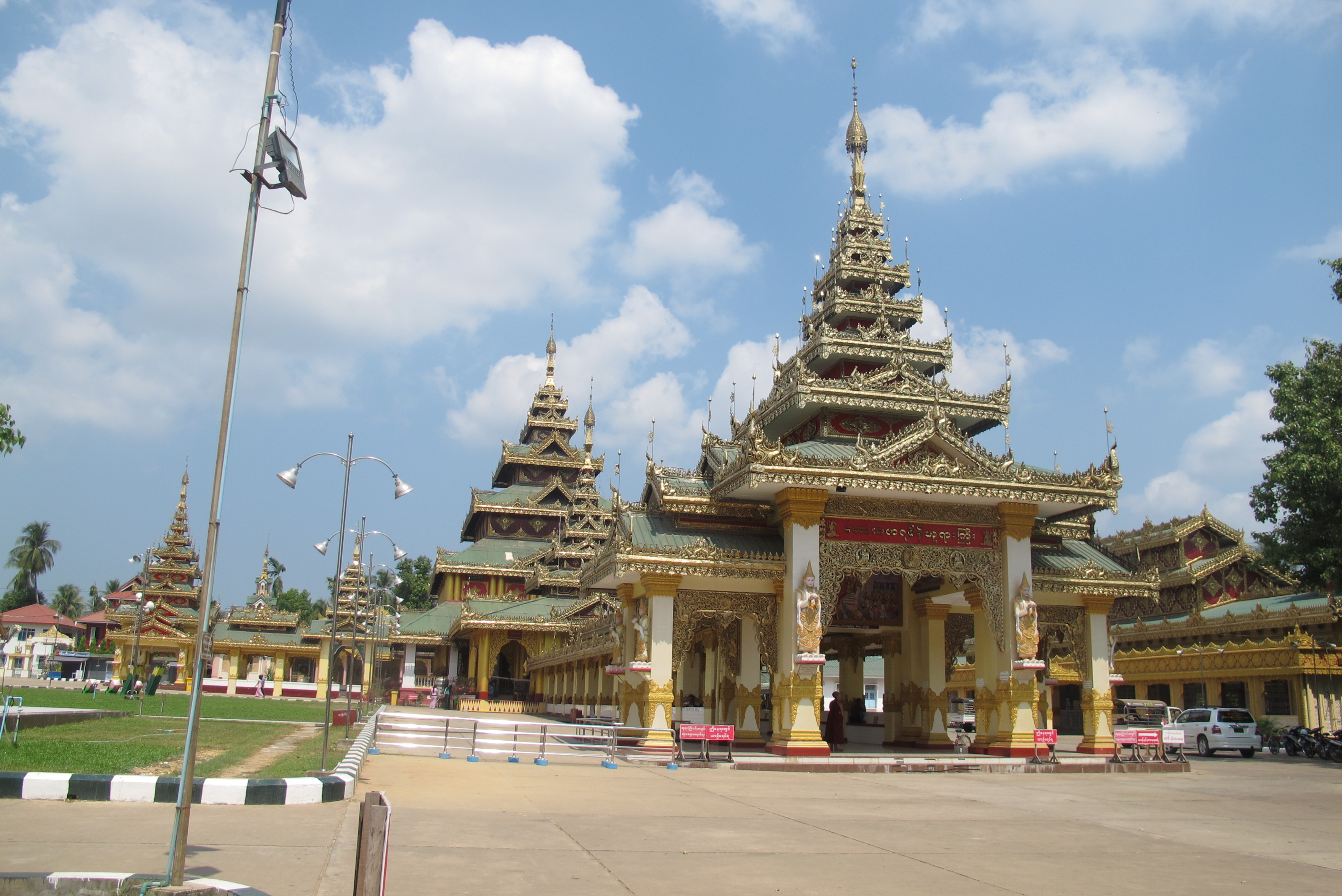 Dawei, Myanmar (Burma)